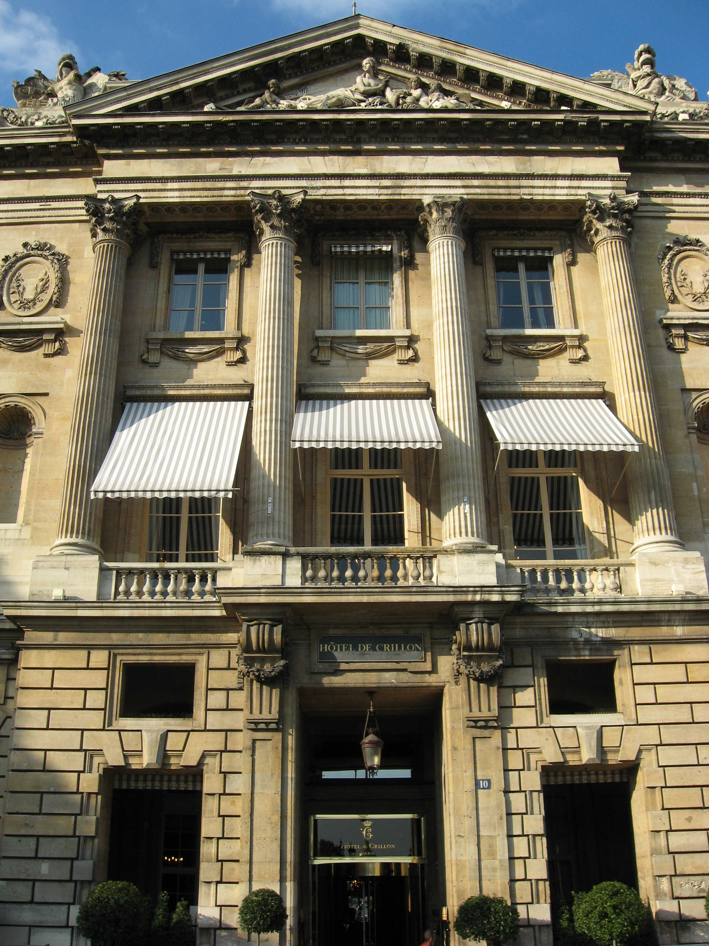 Hôtel de Crillon Paris